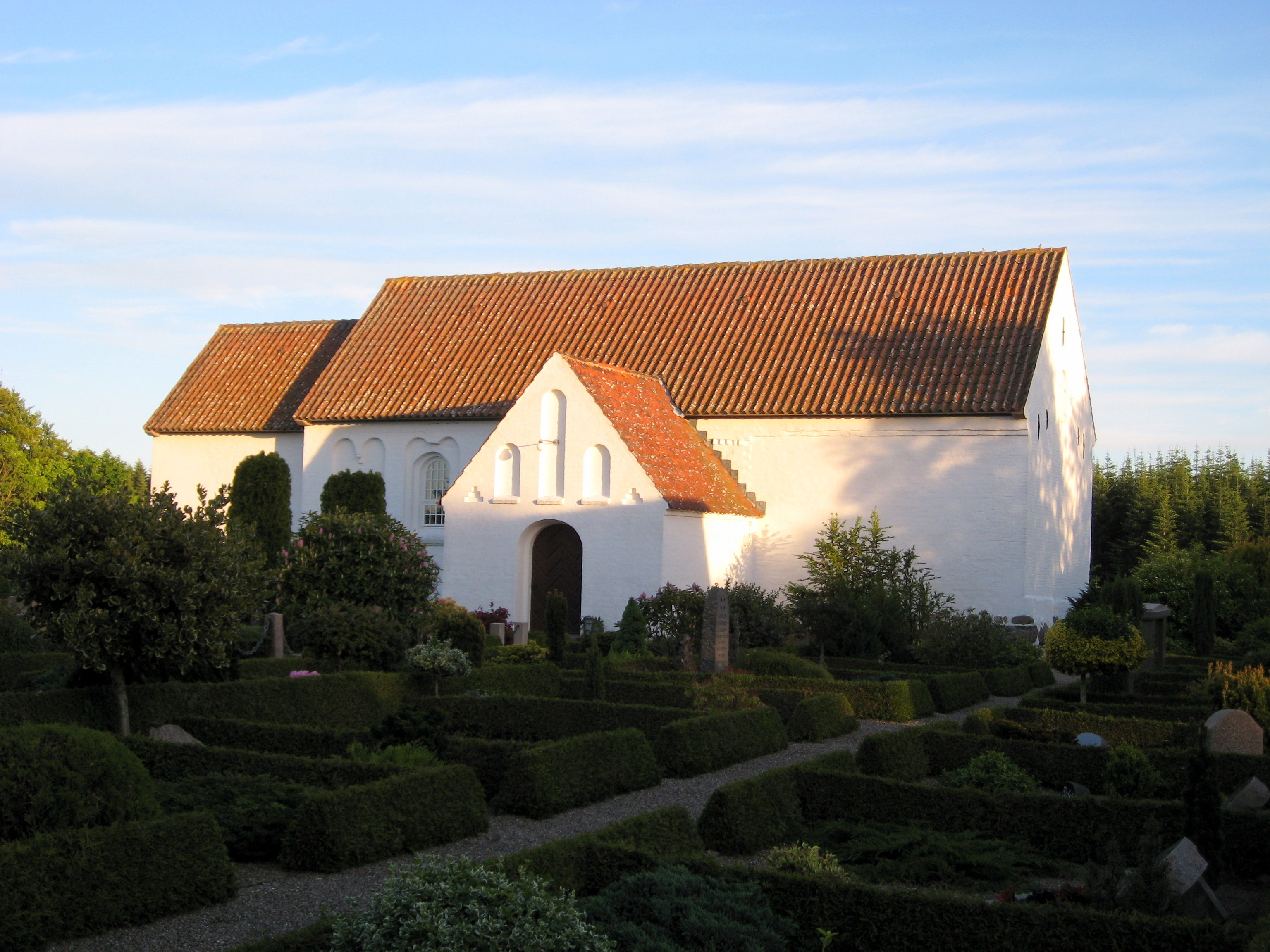 Tolne Kirke, Hjørring Kommune